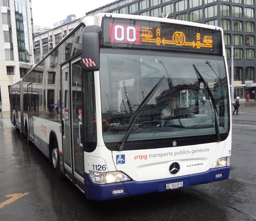 La Saga des Géants à Genève. Une ligne de bus spéciale est créée, qui fait le tour du centre ville. Devant la gare Cornavin.